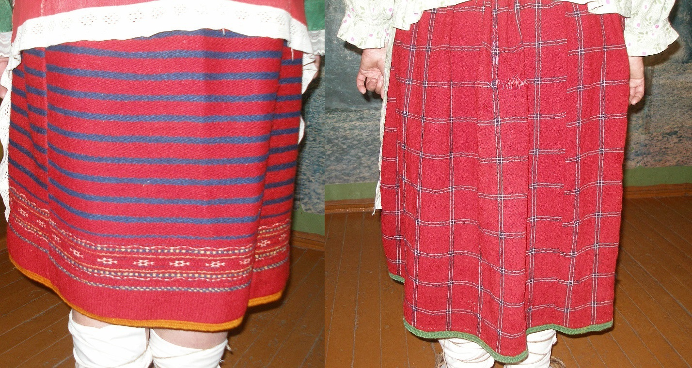 Поньки с.Чермные